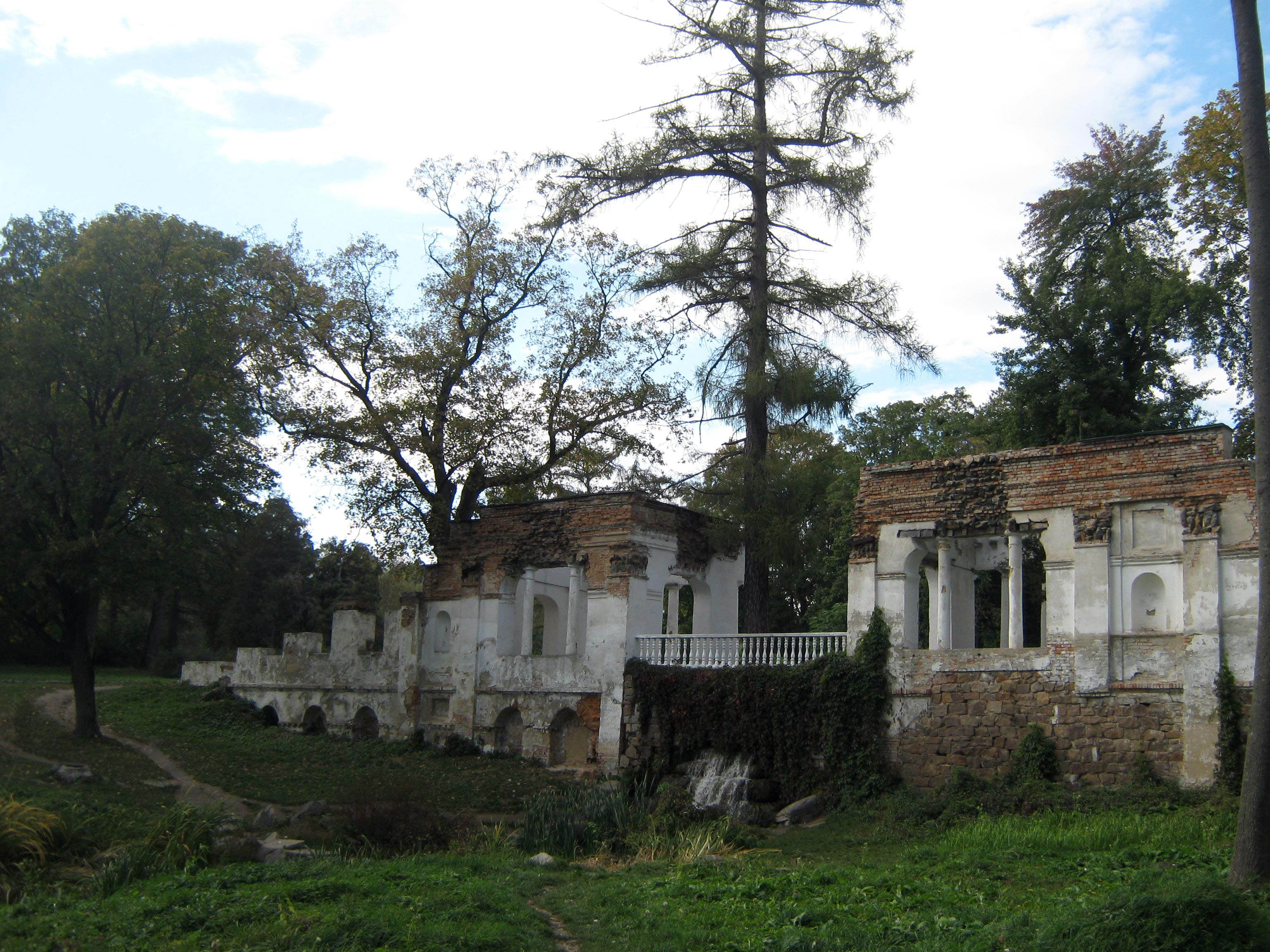 Пам'ятник початково збудований у вигляді руїн. Державний дендрологічний парк «Олександрія» НАН України, Біла Церква.